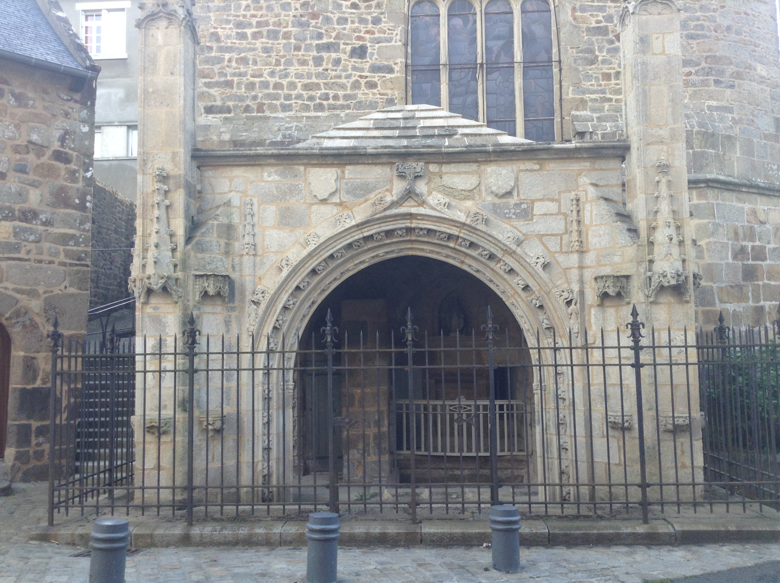 Fronton